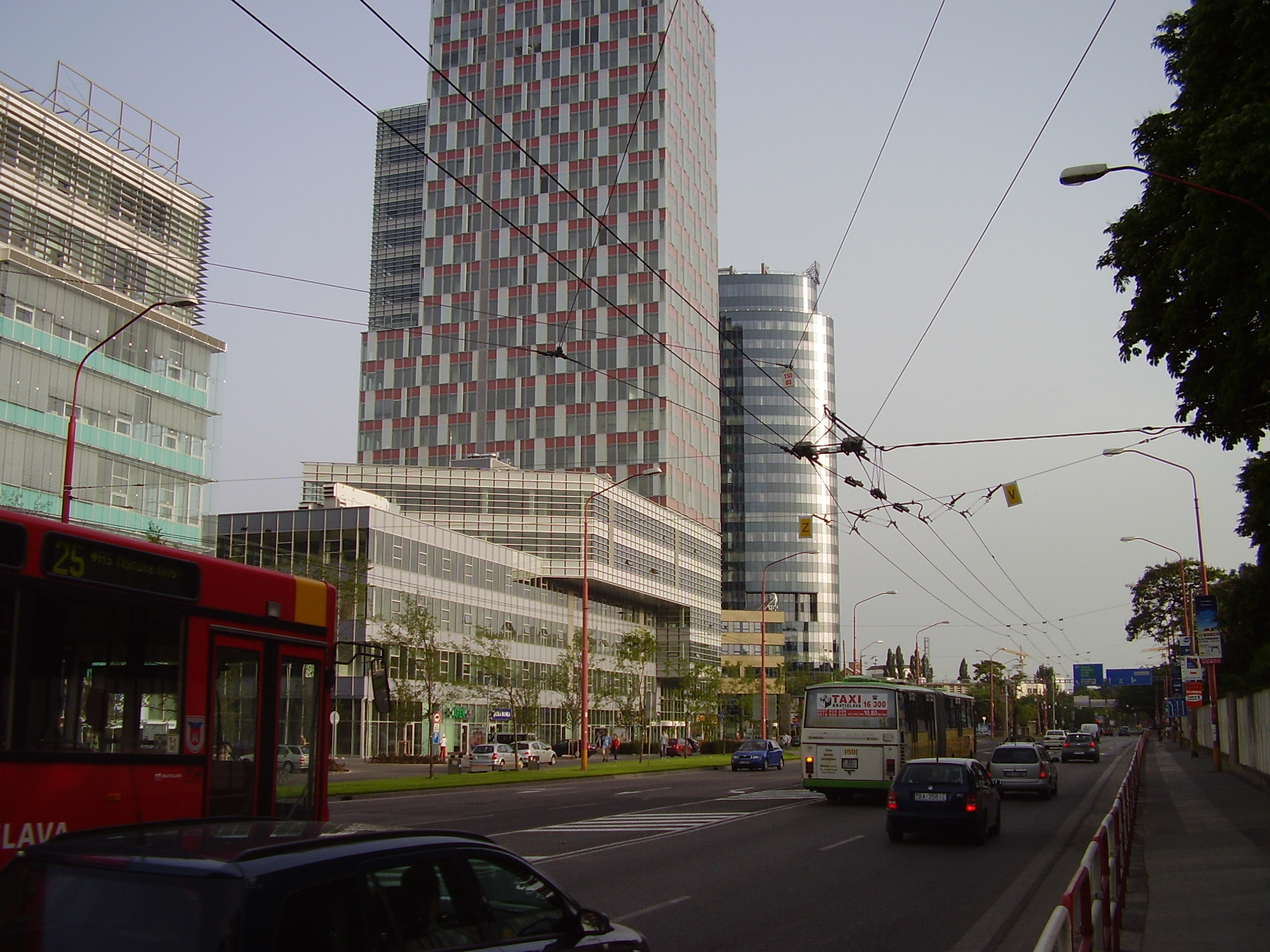 Bratislava